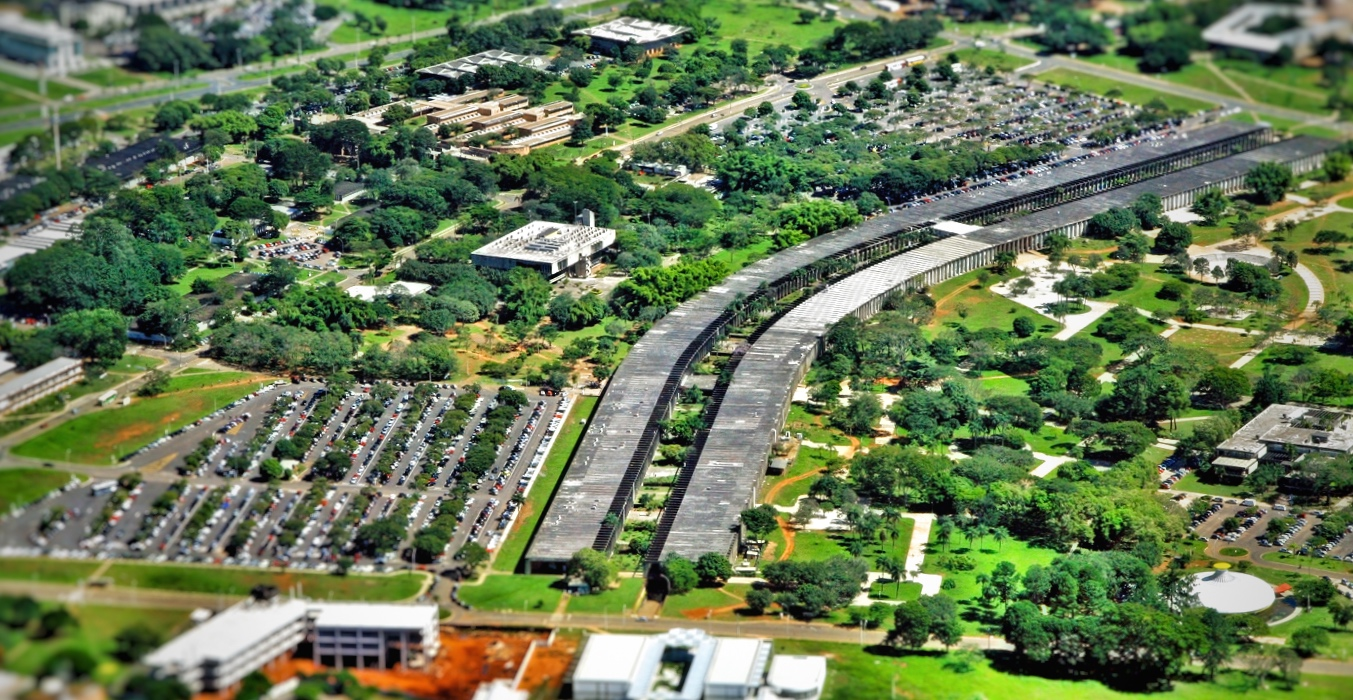 Universidade de Brasília Foto: Beto Monteiro 25 de Abril de 2011